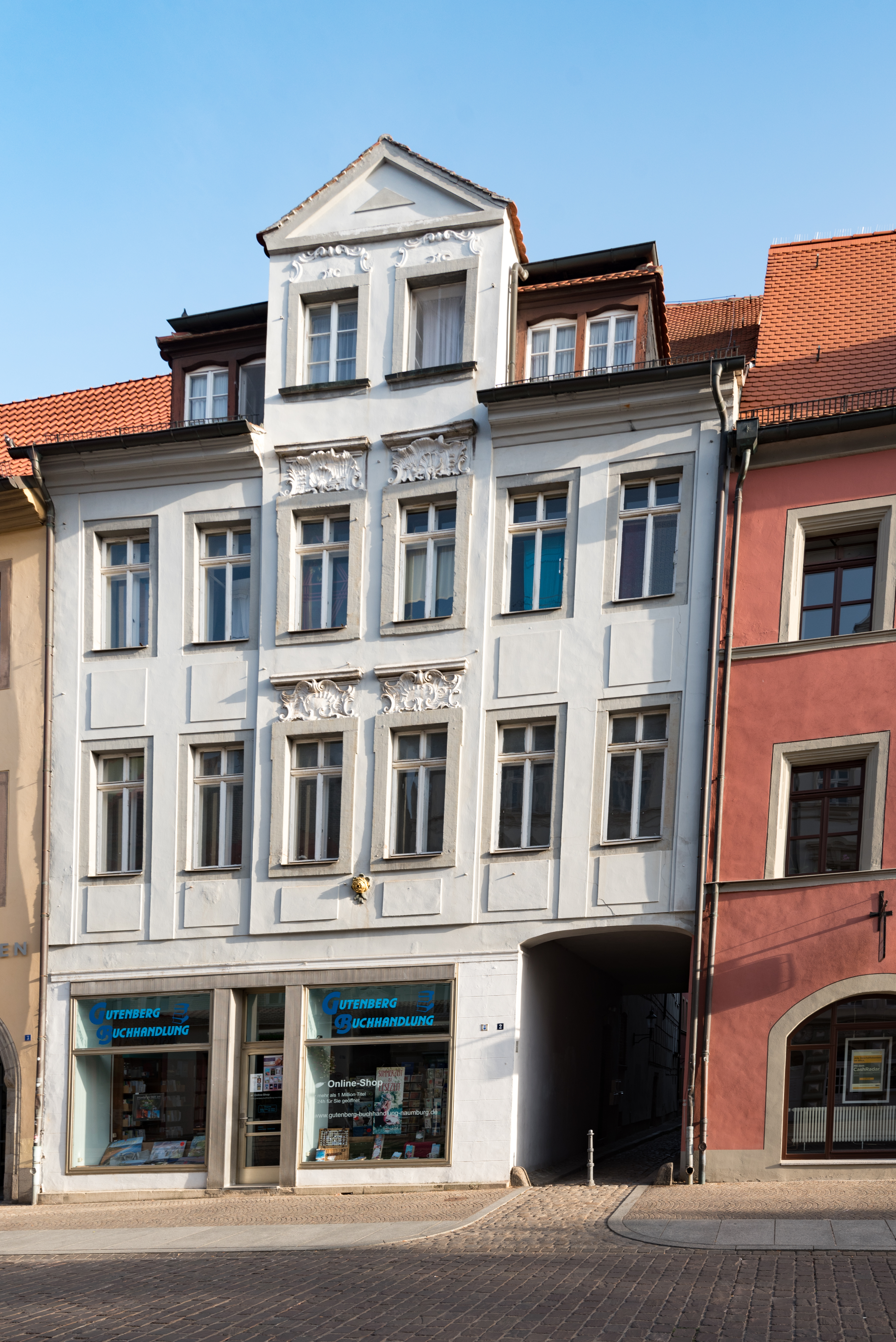 Naumburg (Saale), Jakobstraße 2